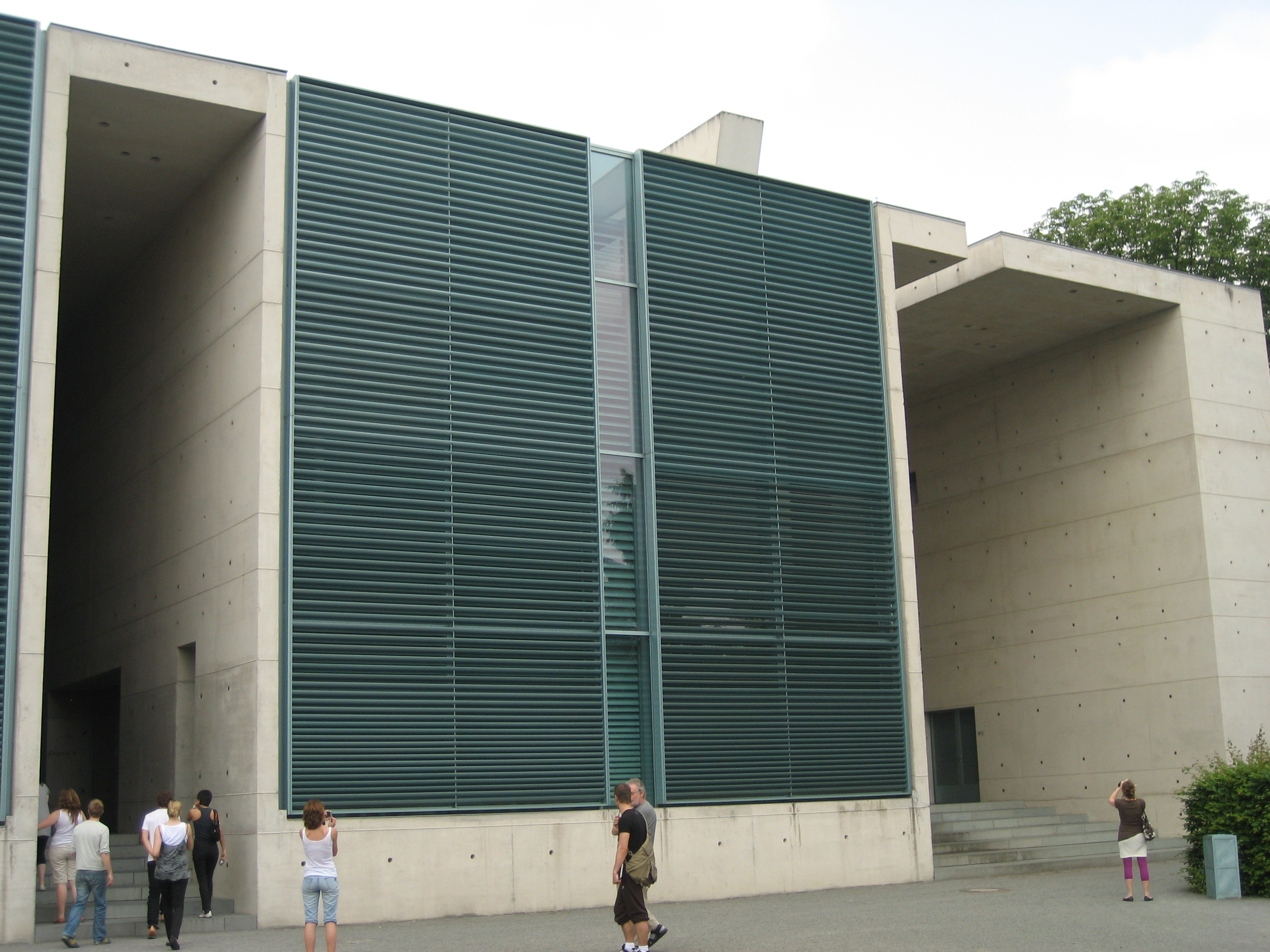 Blumenweg Krematorium, Berlin